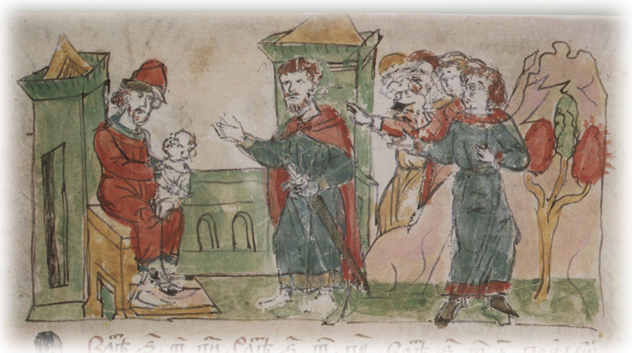 Опис події за 879 рік у Повісті временних літ: «Помер Рюрик і передав княжіння своє Олегові, із свого роду, і віддав йому на руки сина свого Ігоря, бо вельми малий був».